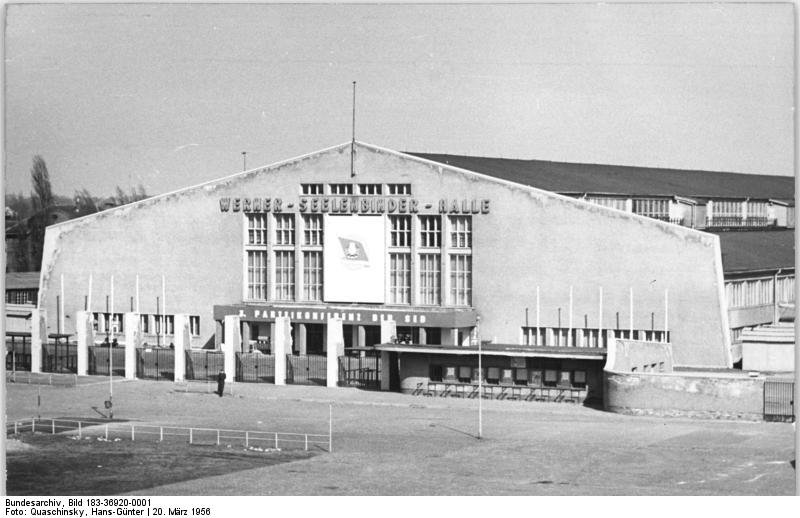 Berlin, Werner-Seelenbinder-Halle Zentralbild Quasch. 20.3.1956 Die Werner-Seelenbinder-Halle in Berlin Tagungsort der 3. Parteikonferenz der Sozialistischen Einheitspartei Deutschlands. (24. - 29.3.1956)